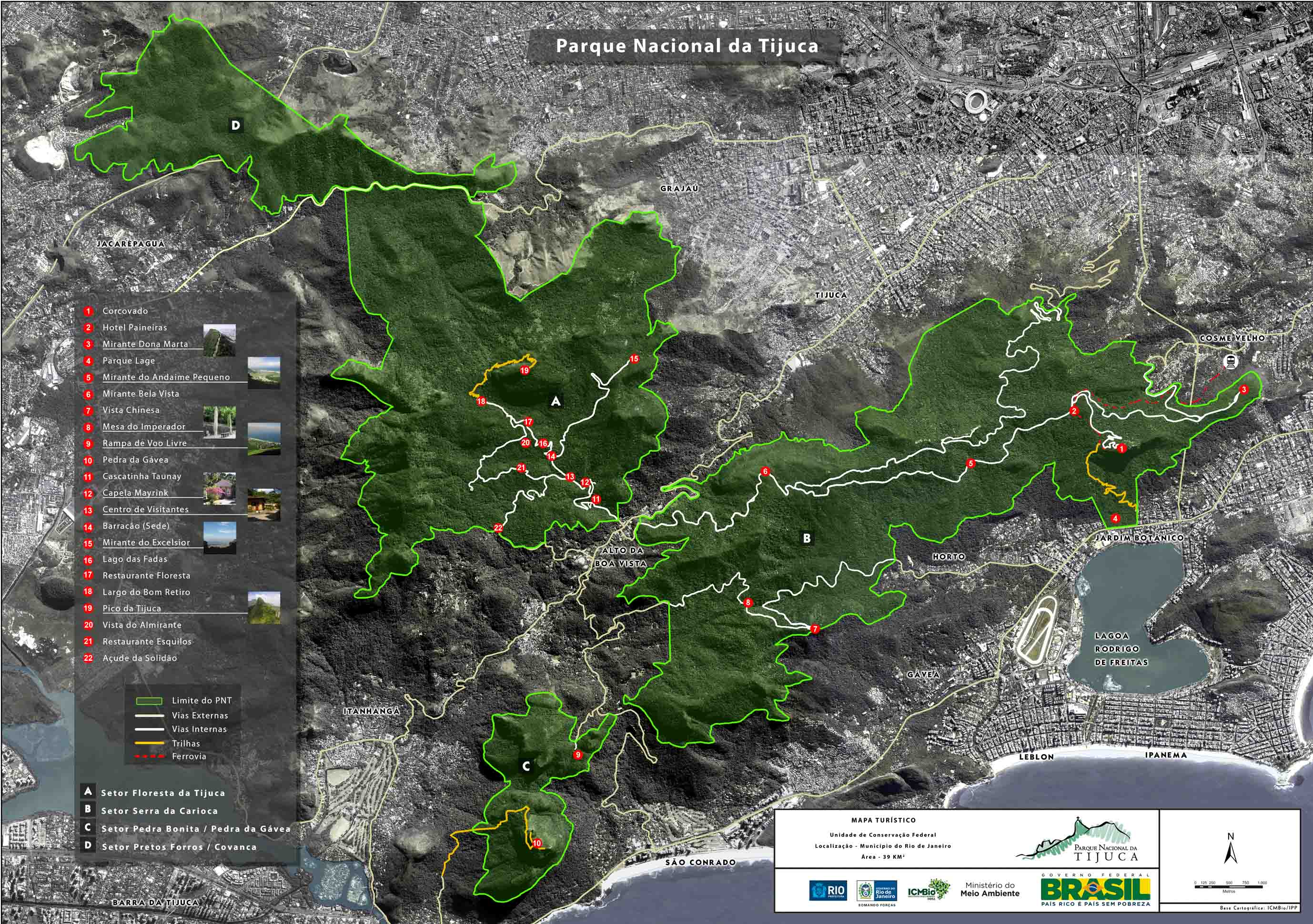 Mapa do Parna-Tijuca feito com hortofoto